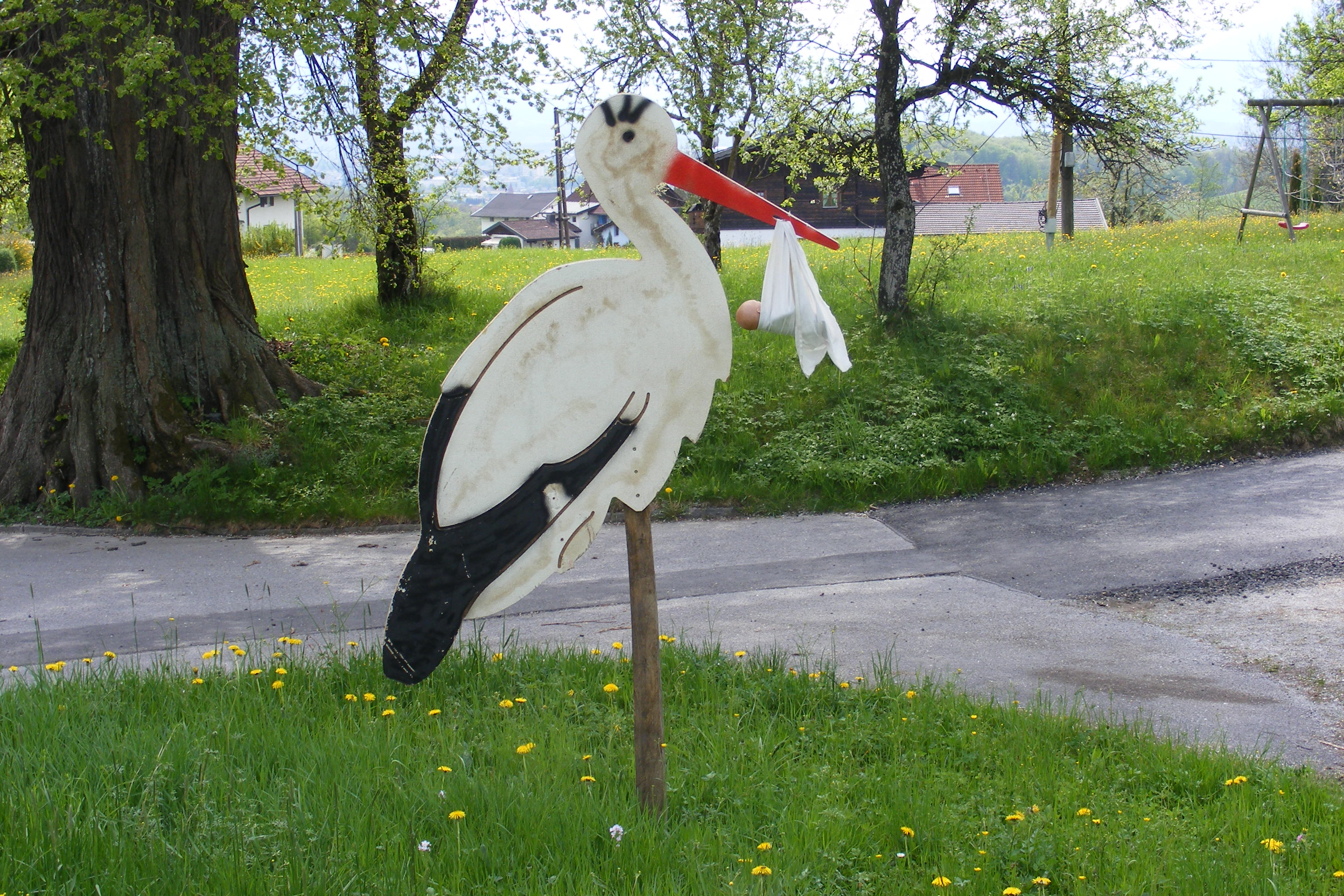 Storchenfigur mit Babyattrappe als Symbolisierung einer Geburt